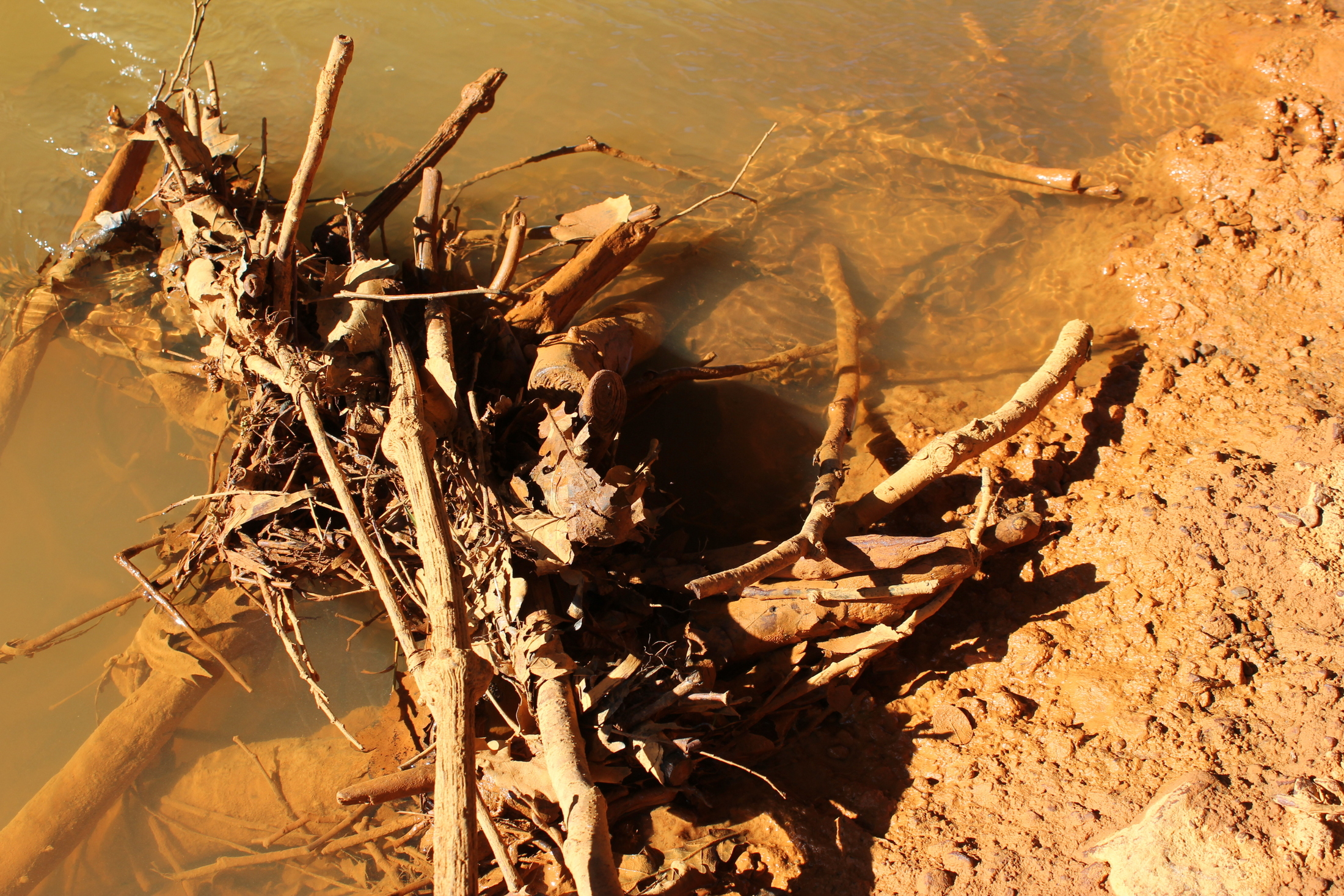 Hornjoserbsce: "Bruna Sprjewja" w Grodku.